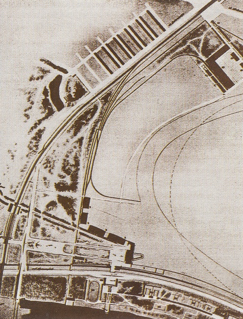 Projekt konkursowy portu lotniczego na Gocławiu (II nagroda, Zbigniew Czech i Janusz Kieszkowski)